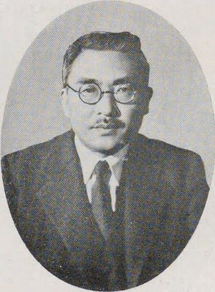 加賀谷朝蔵